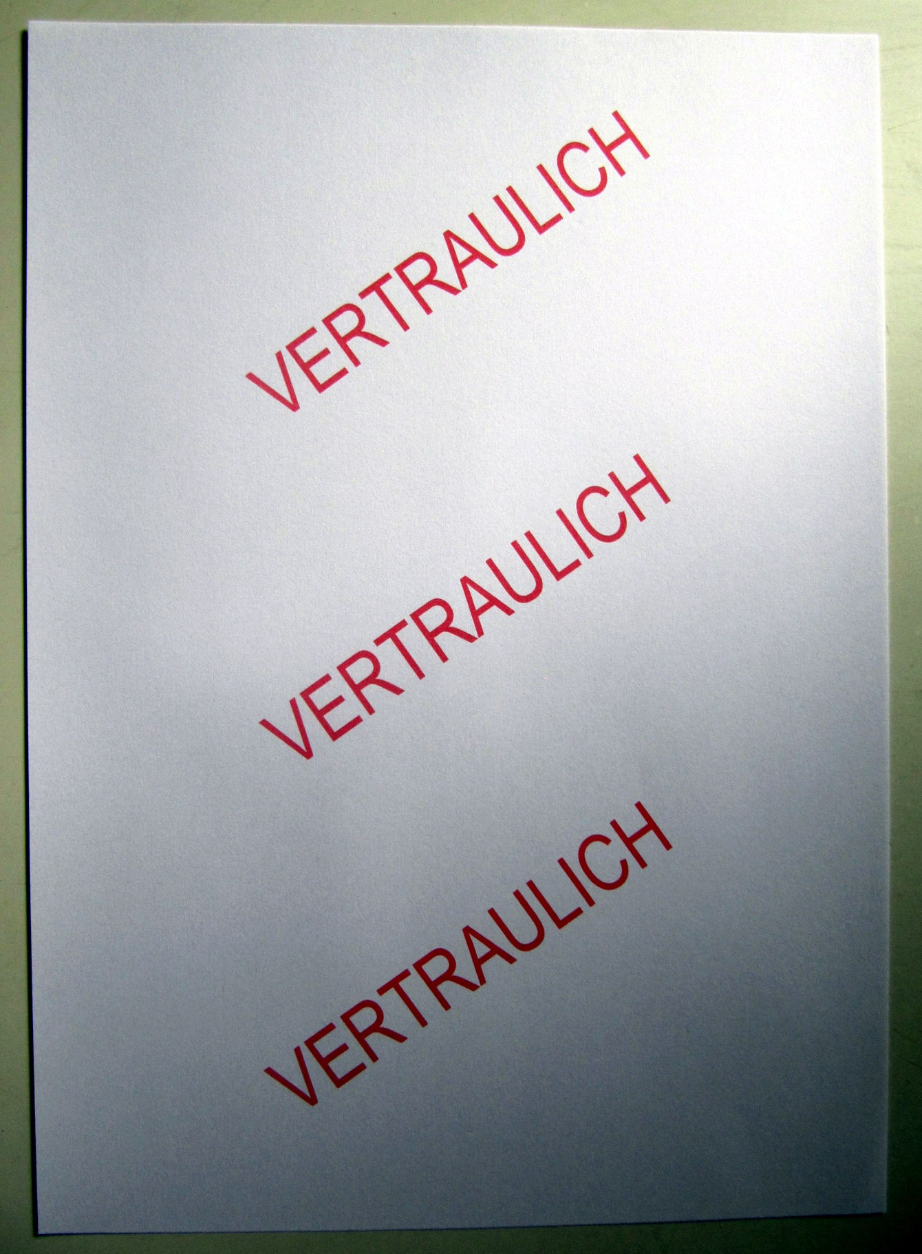 DIN-A4-Seite mit drei "VERTRAULICH"-Stempeln, die von Bürgerschaft und Senat in der Freien und Hansestadt Hamburg verwendet wird.